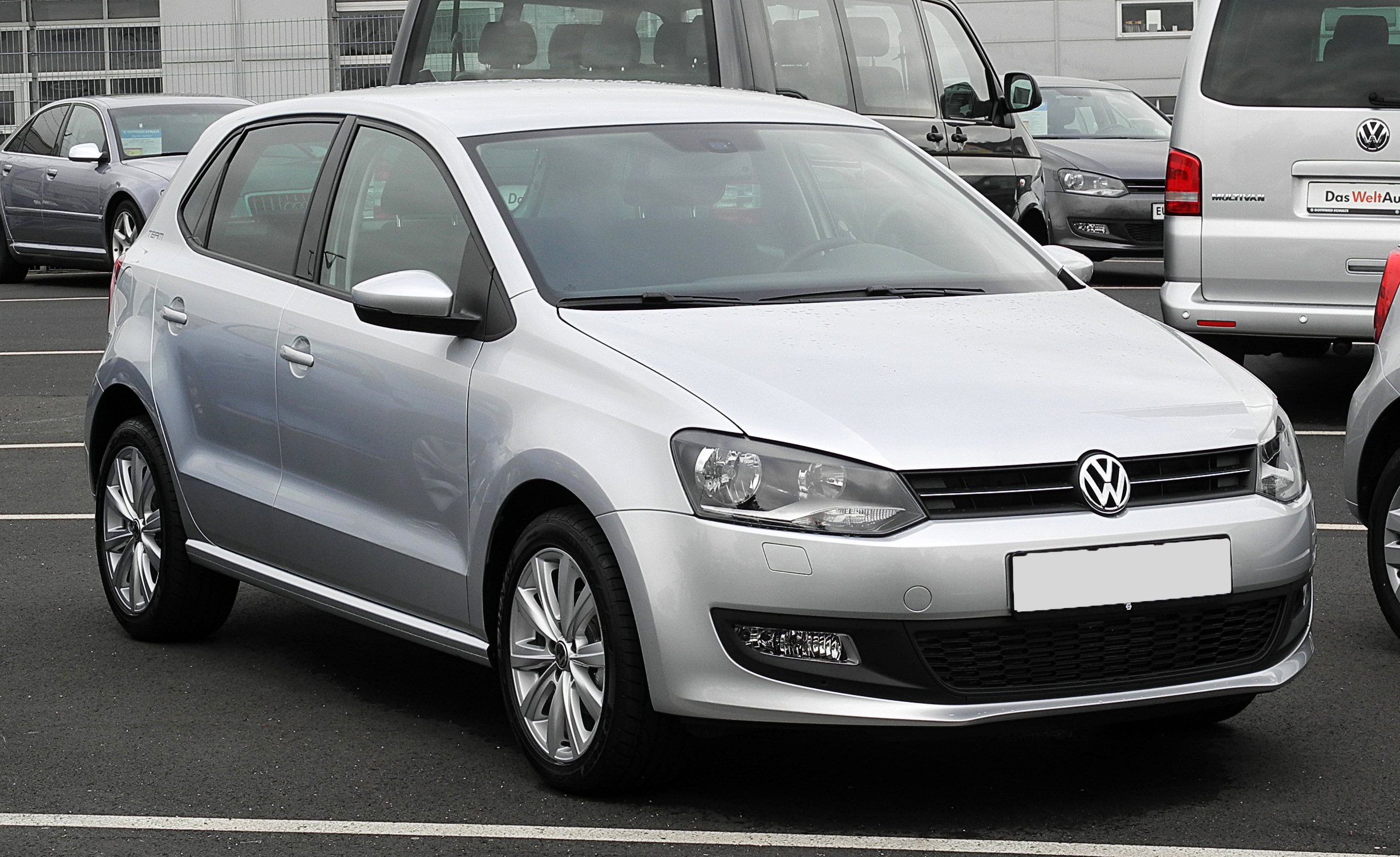 VW Polo 1.4 Team (V)